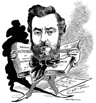 "Silhouettes parisiennes - Maurice Talmeyr (photographie Pierre Petit)."